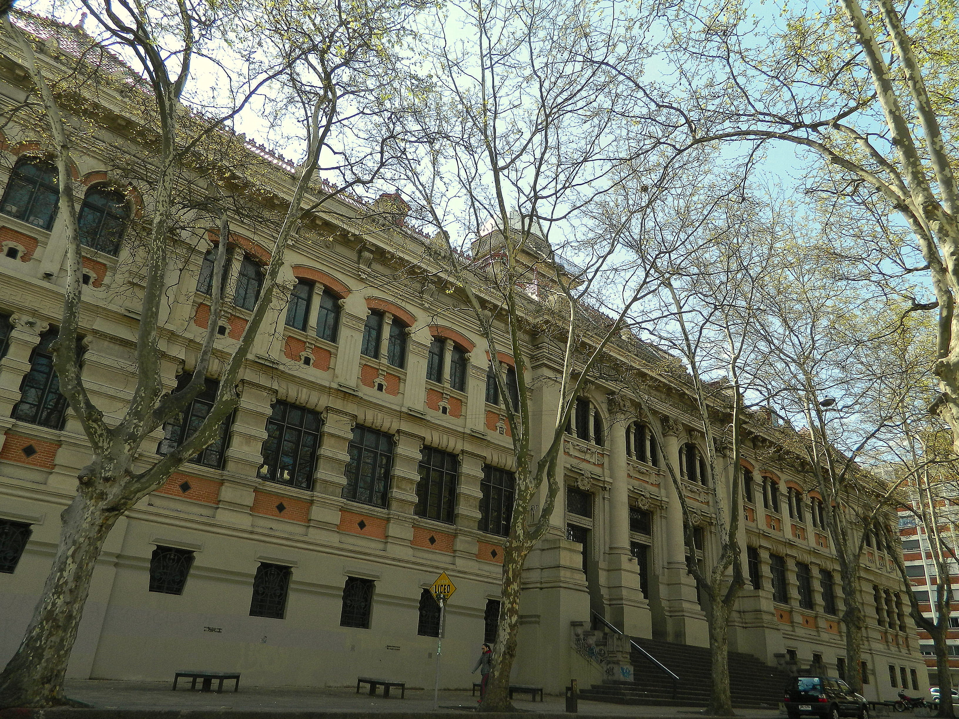 Instituto Alfredo Vásquez Acevedo (I.A.V.A.). Ubicada en el departamento de Montevideo